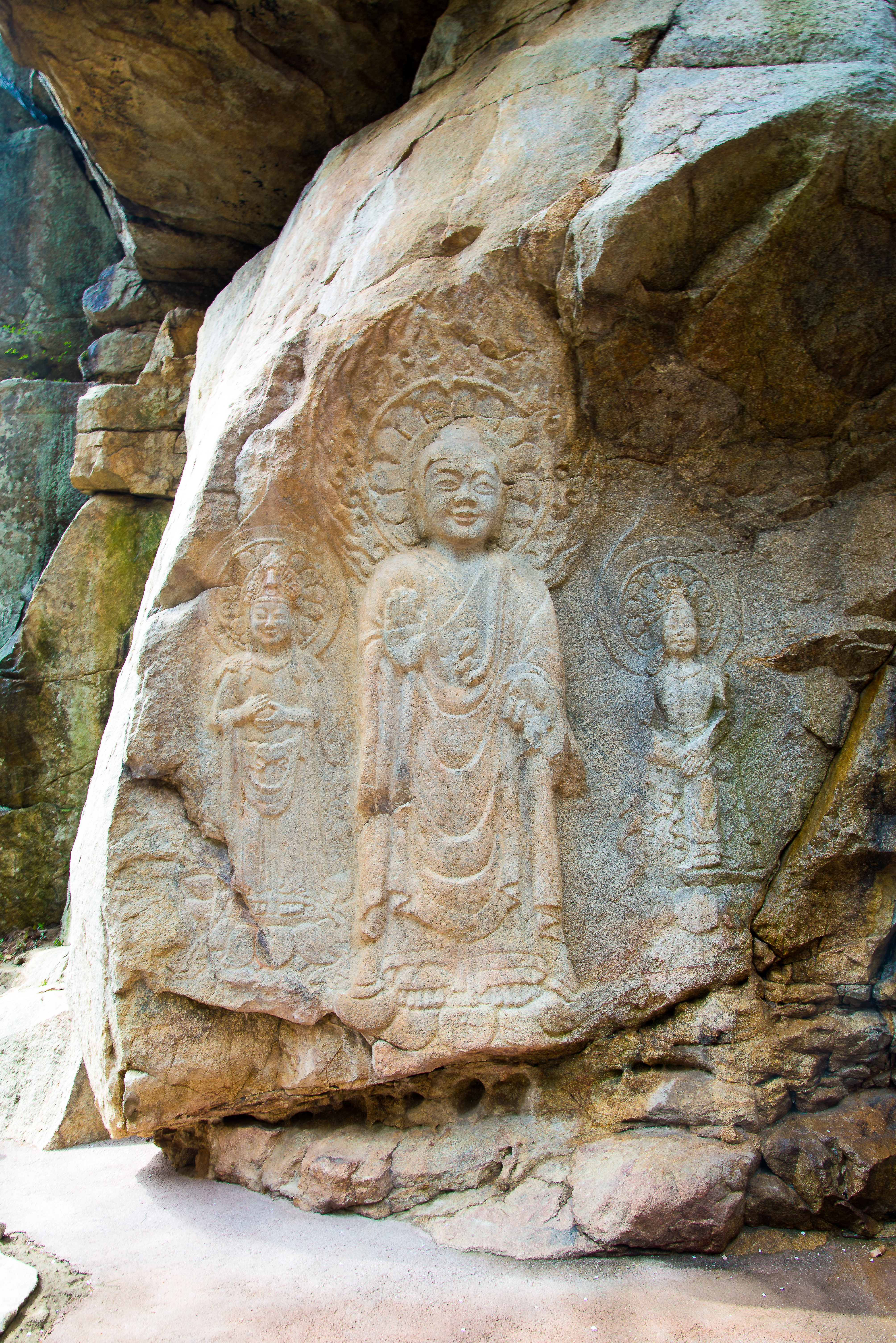 용현리 마애여래삼존상